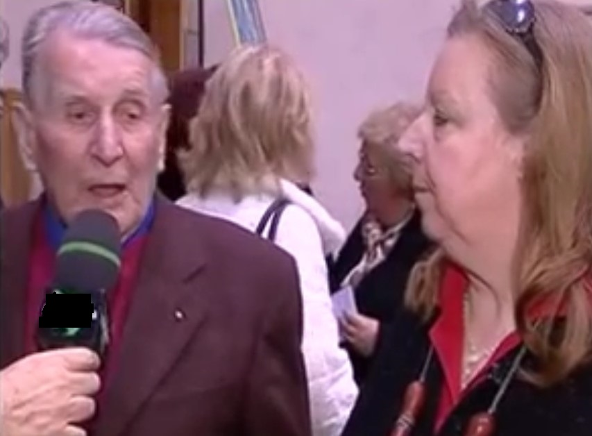 Premiazione del Concorso Letterario Lilly Brogi La Pergola Arte 2008